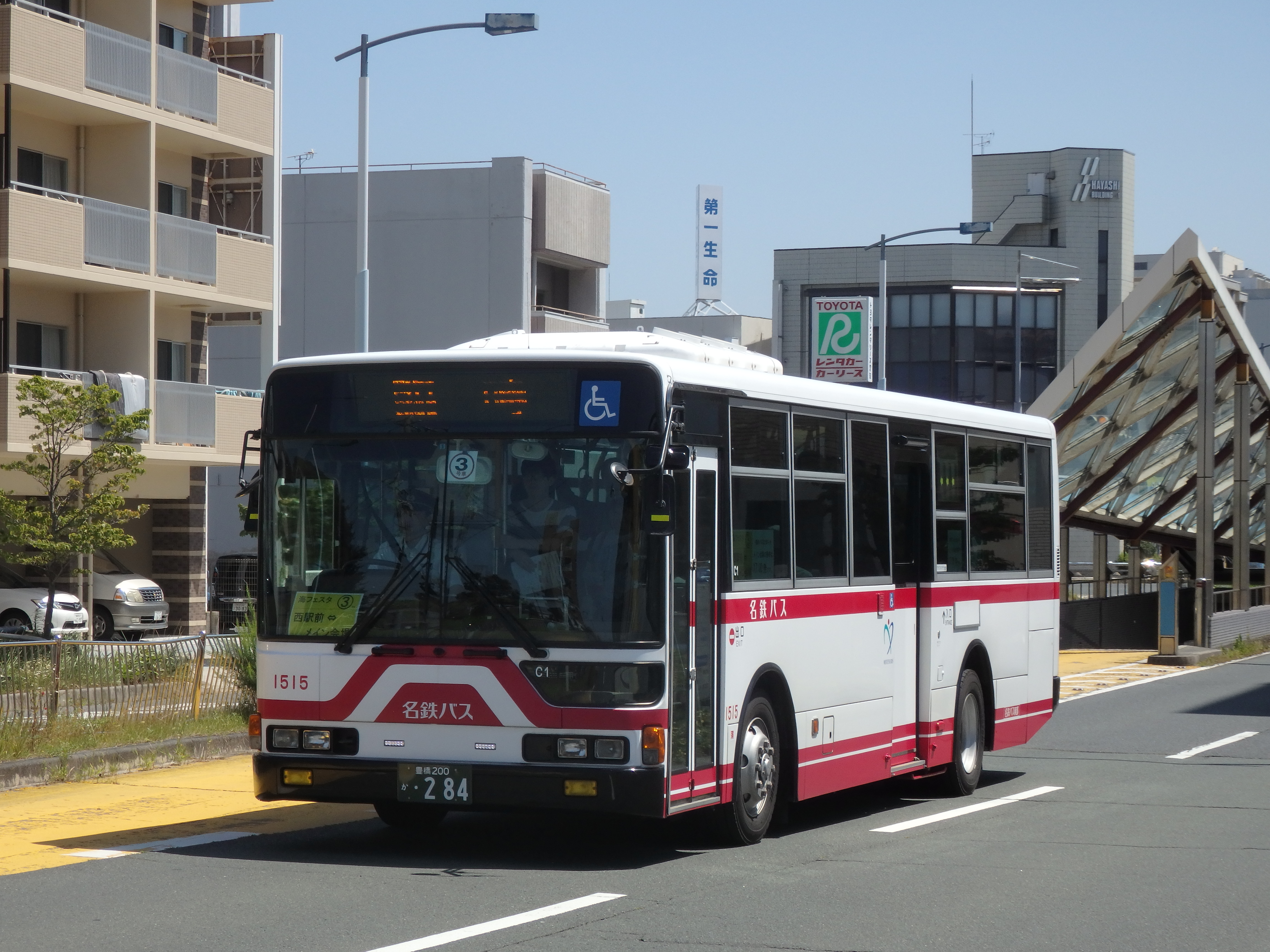 名鉄バス東部蒲郡営業所所属の05年式エアロスターワンステップ